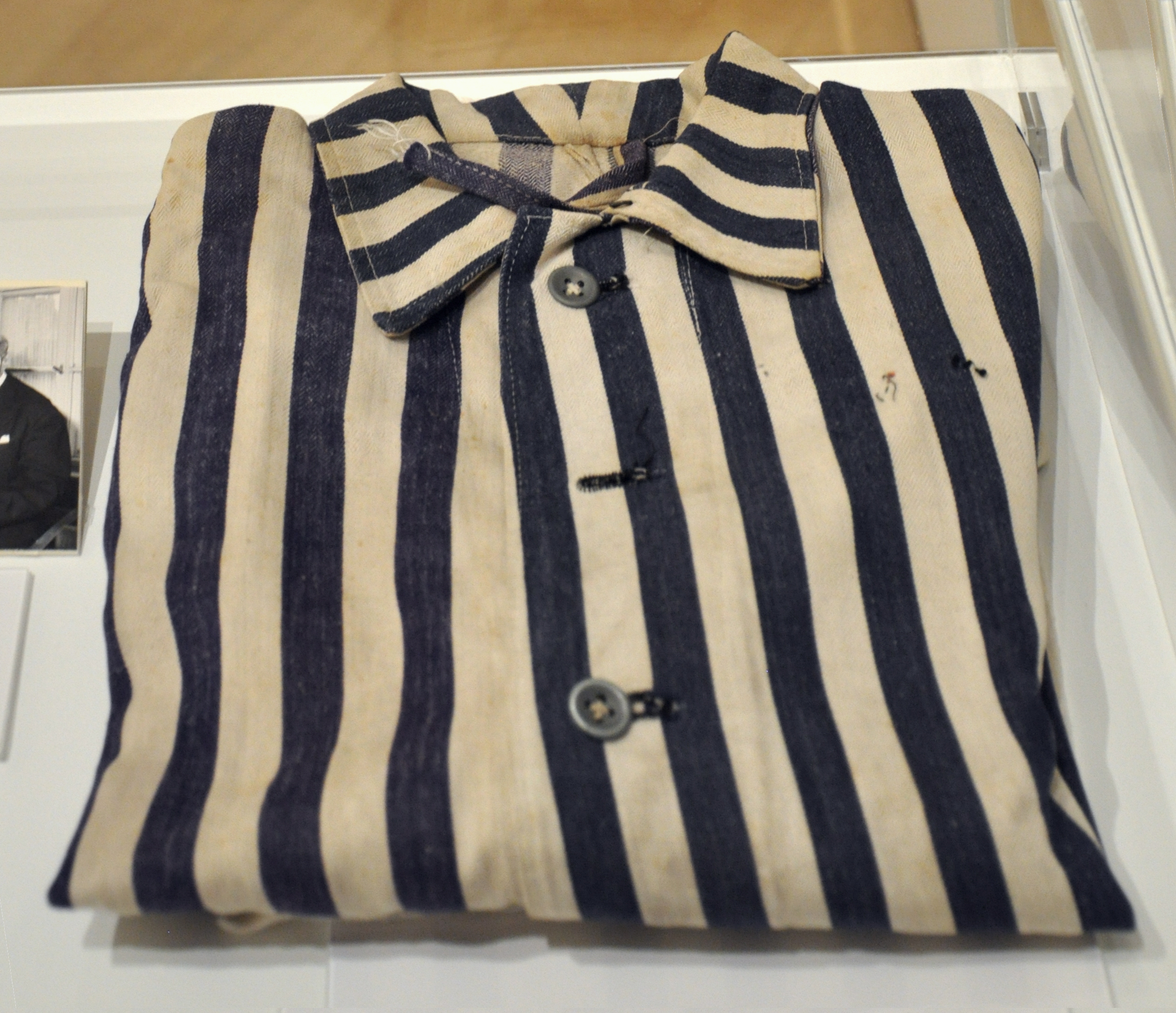 Bregenz, Vorarlberg Museum, KZ-Jacke von Max Riccabona aus dem Konzentrationslager Dachau; Halbleinen; private Leihgabe Vorarlberg museum Native namevorarlberg museumLocationBregenz, Vorarlberg, AustriaCoordinates47° 30′ 15.84″ N, 9° 44′ 48.01″ E Established1857Web pageVorarlberg Museum websiteAuthority control : Q2533480 VIAF: 124091336 ISNI: 0000 0001 2242 622X LCCN: n50051186 GND: 18871-2 SUDOC: 030717523 WorldCat institution QS:P195,Q2533480